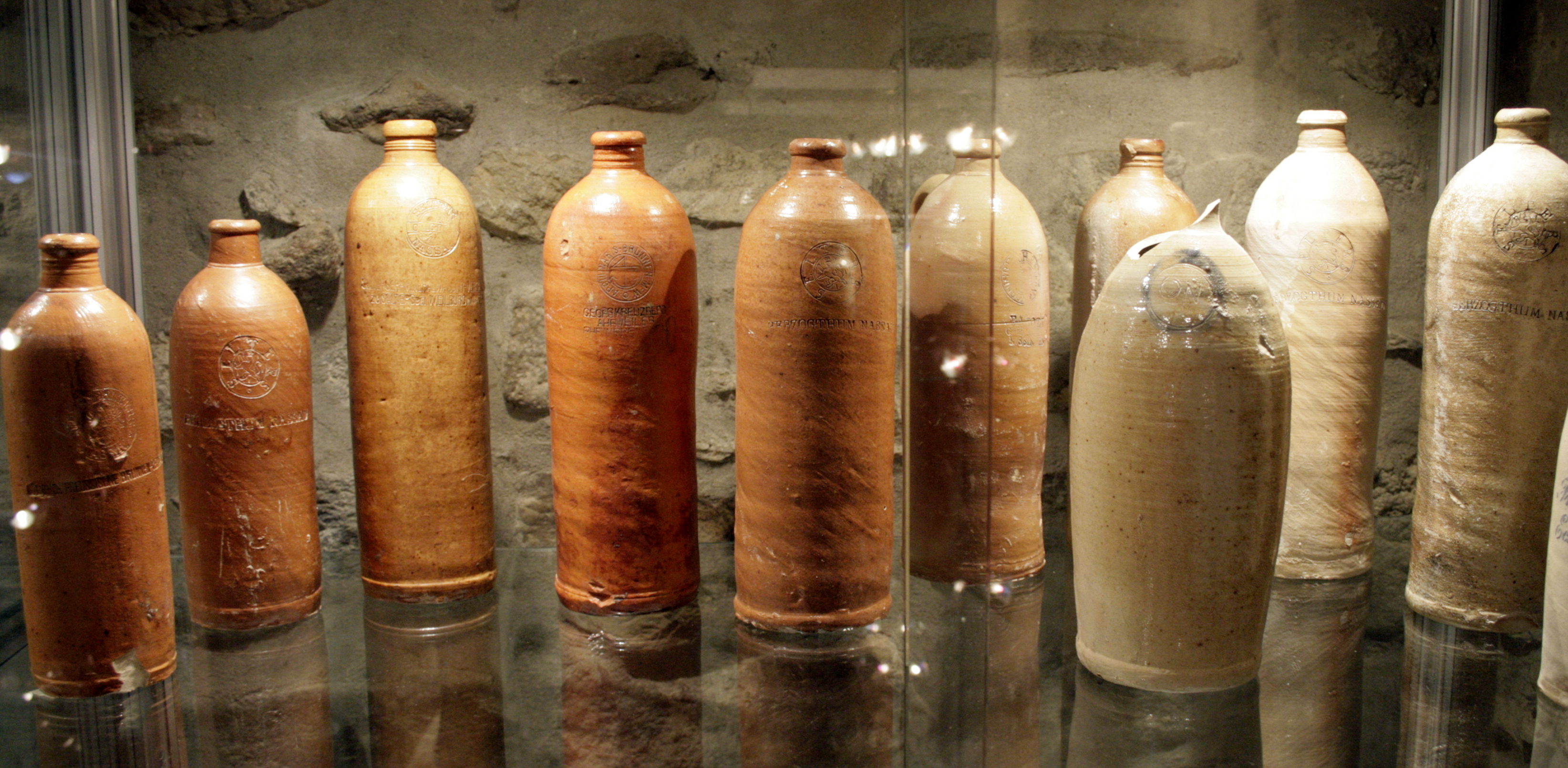 Mineralwasserkrüge aus dem 19. Jahrhundert im Turmmuseum Mengerskirchen, Deutschland